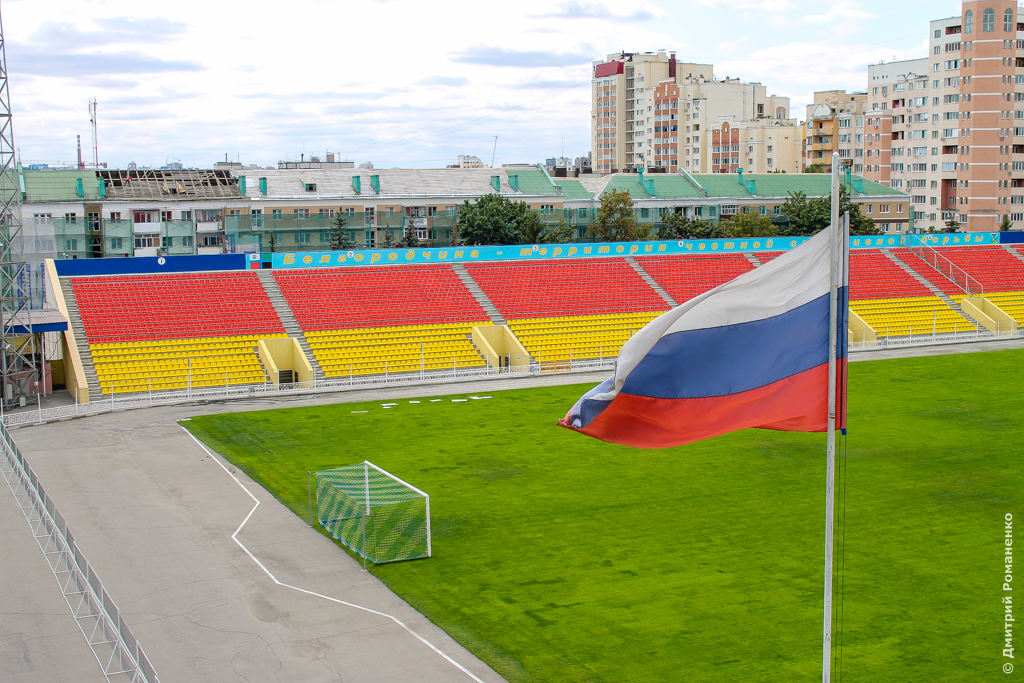 Типичный Белгород. Фотография сделана с опор освещения Белгородского стадиона "Салют" (ныне "Энергомаш").